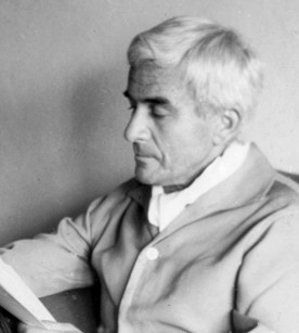 Witold Chromiński